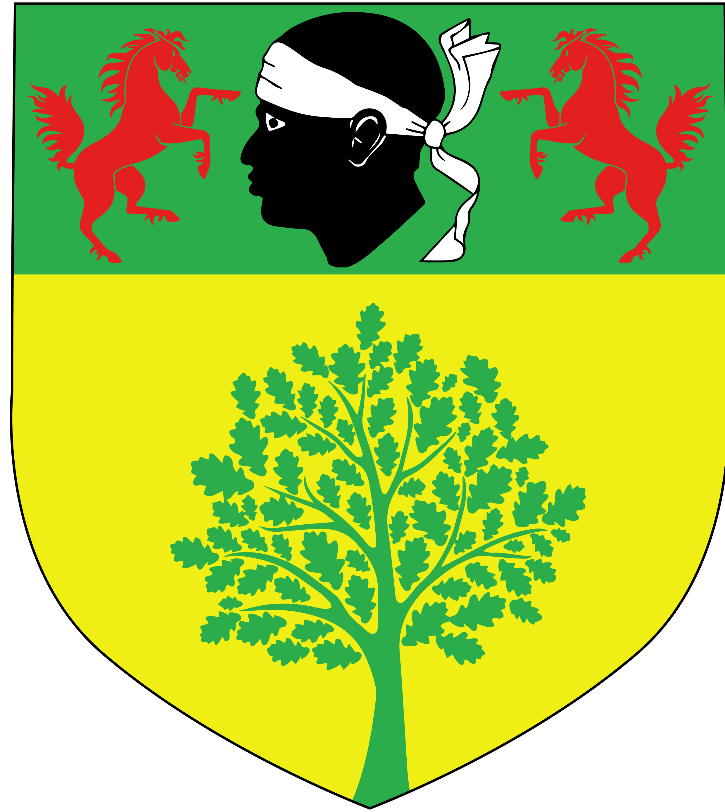 Corsu: Eraldica di Riventosa